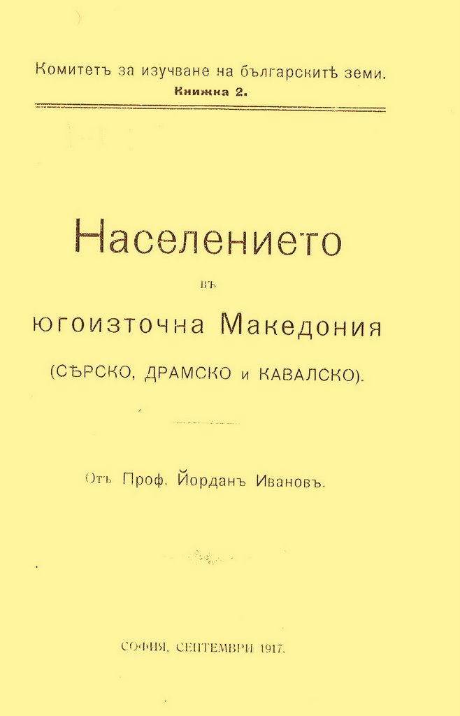 Населението в Югоизточна Македония